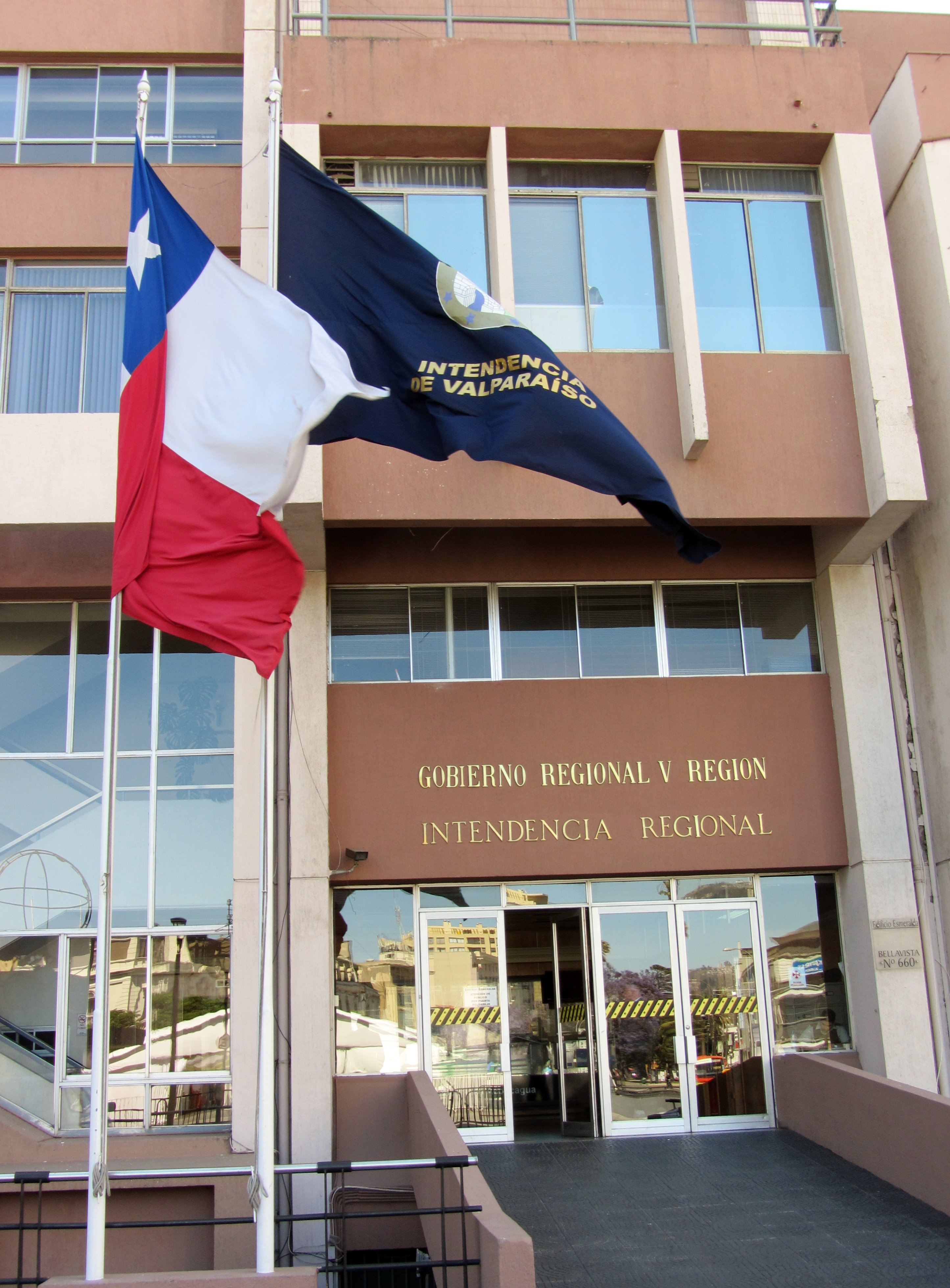 Sede del Gobierno Regional de Valparaíso, Melgarejo 699, con las banderas chilena y regional.